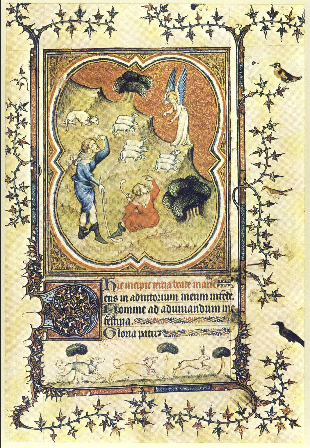 Miniatur "Engel und Hirten"